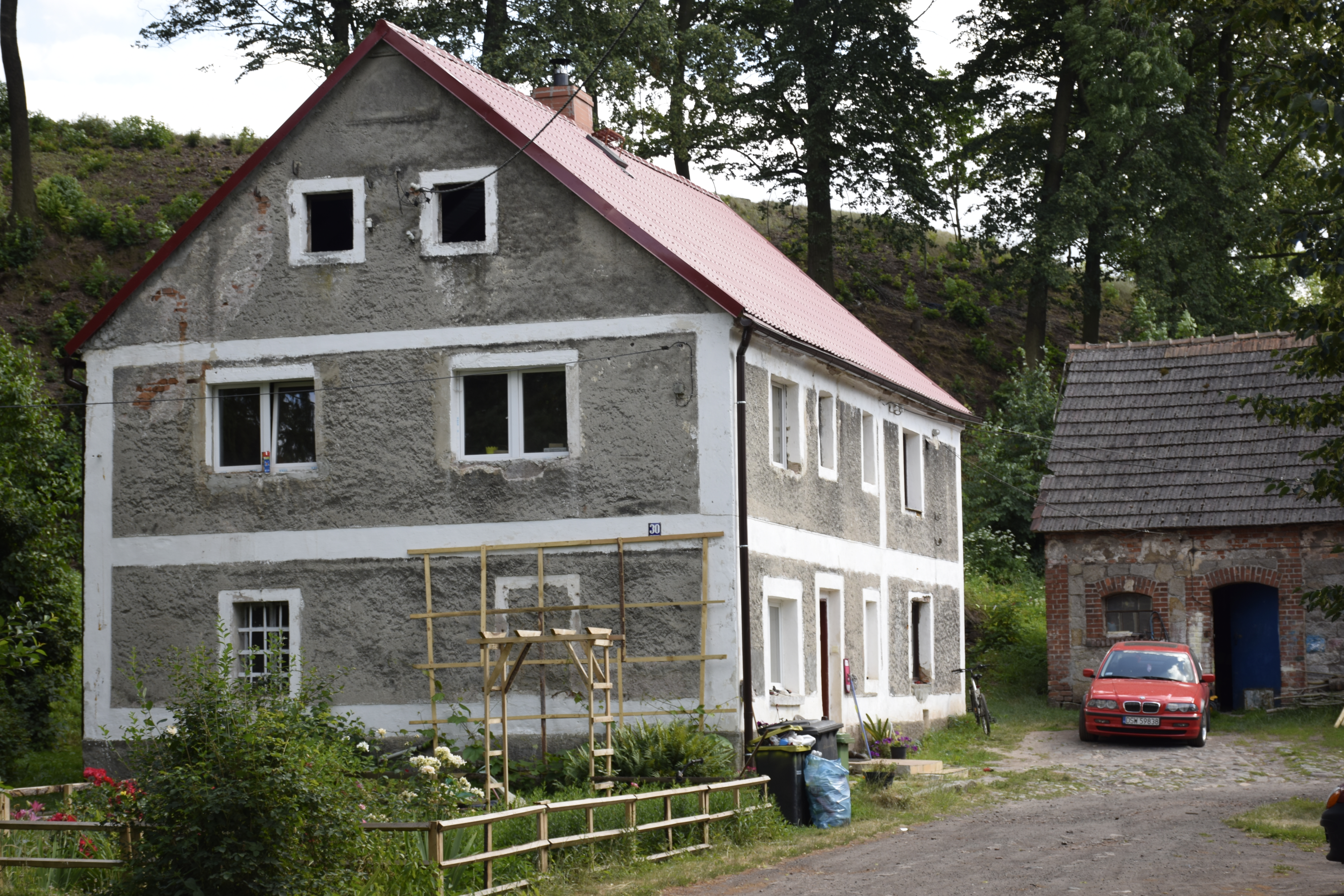 Wolbromek. Polska.